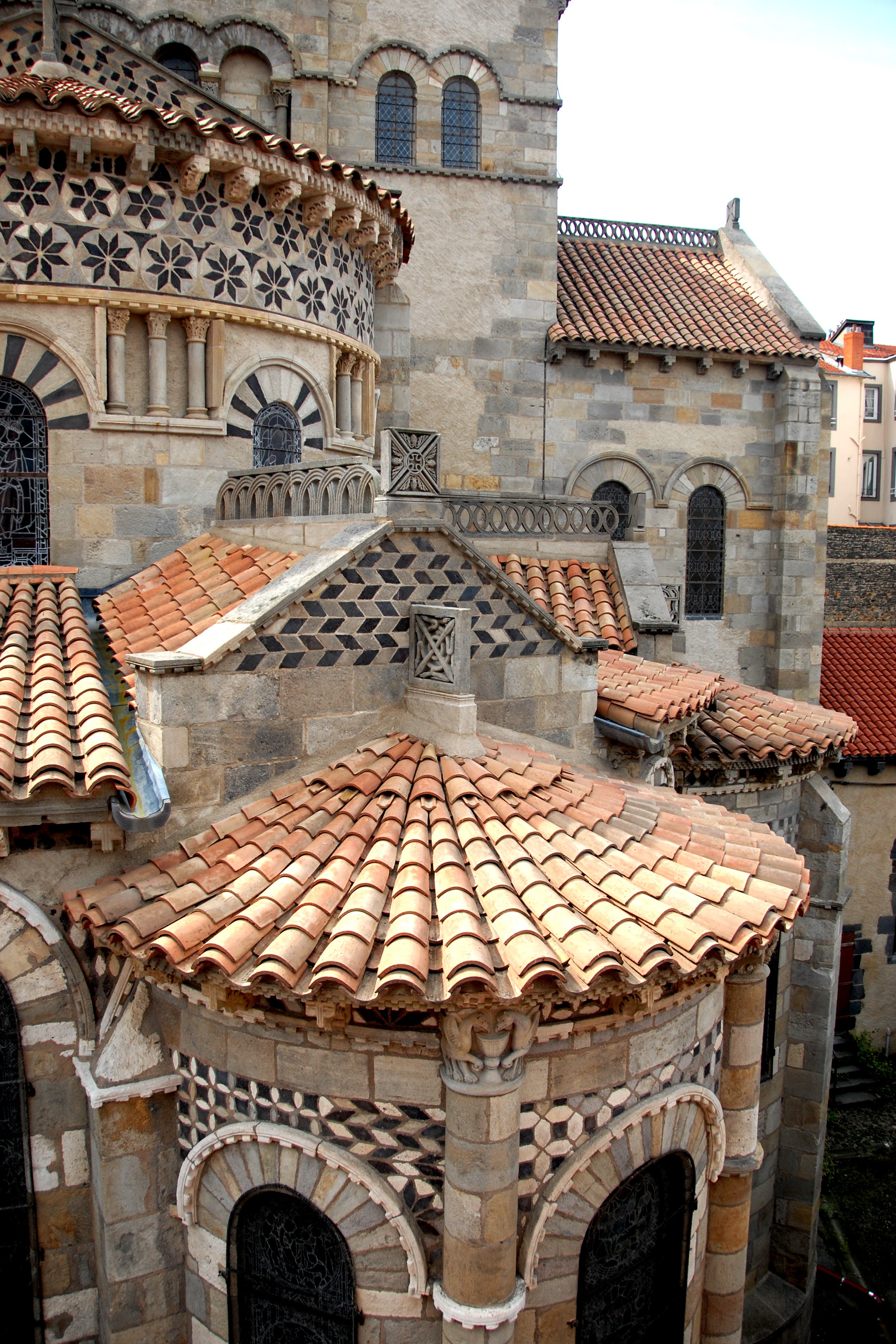 Notre-Dame du Port, Dachlandschaft Umgangskapellen, nördl. Bereich